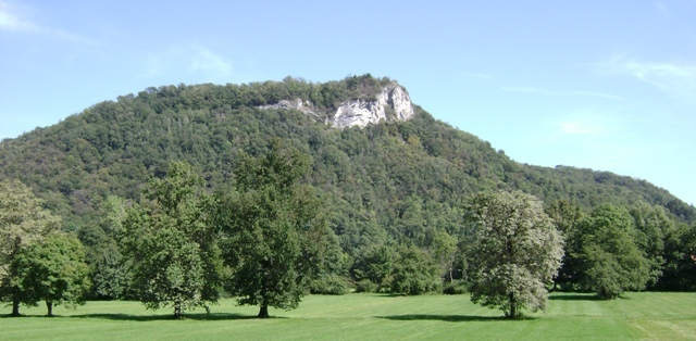 Vista del Picuz